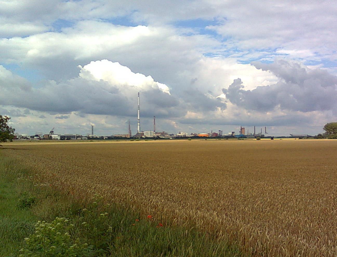 Duslo